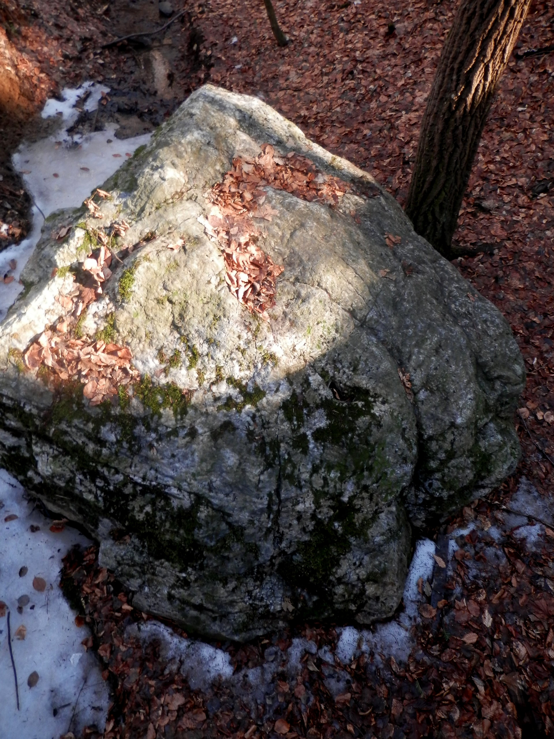 Čertov kameň. Na južnom okraji Lesoparku Cemjata, v lese pod Ščerbovou horou, v potoku Čertov jarok 300 m od štátnej cesty II/546 (Prešov-Margecany), leží balvan zo žilného kremeňa rozmerov asi 2 x 3 m, ktorý sa volá Čertov kameň. Vznikol asi pred 23 až 45 mil. rokov.